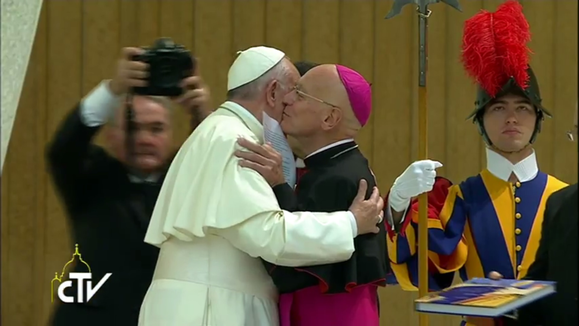 Mgr André Marceau embrassant le pape à la suite de son introduction de l'audience donnée par le pape pour le diocèse de Nice suite à l'attentat perpétré à Nice le 14 juillet 2016.